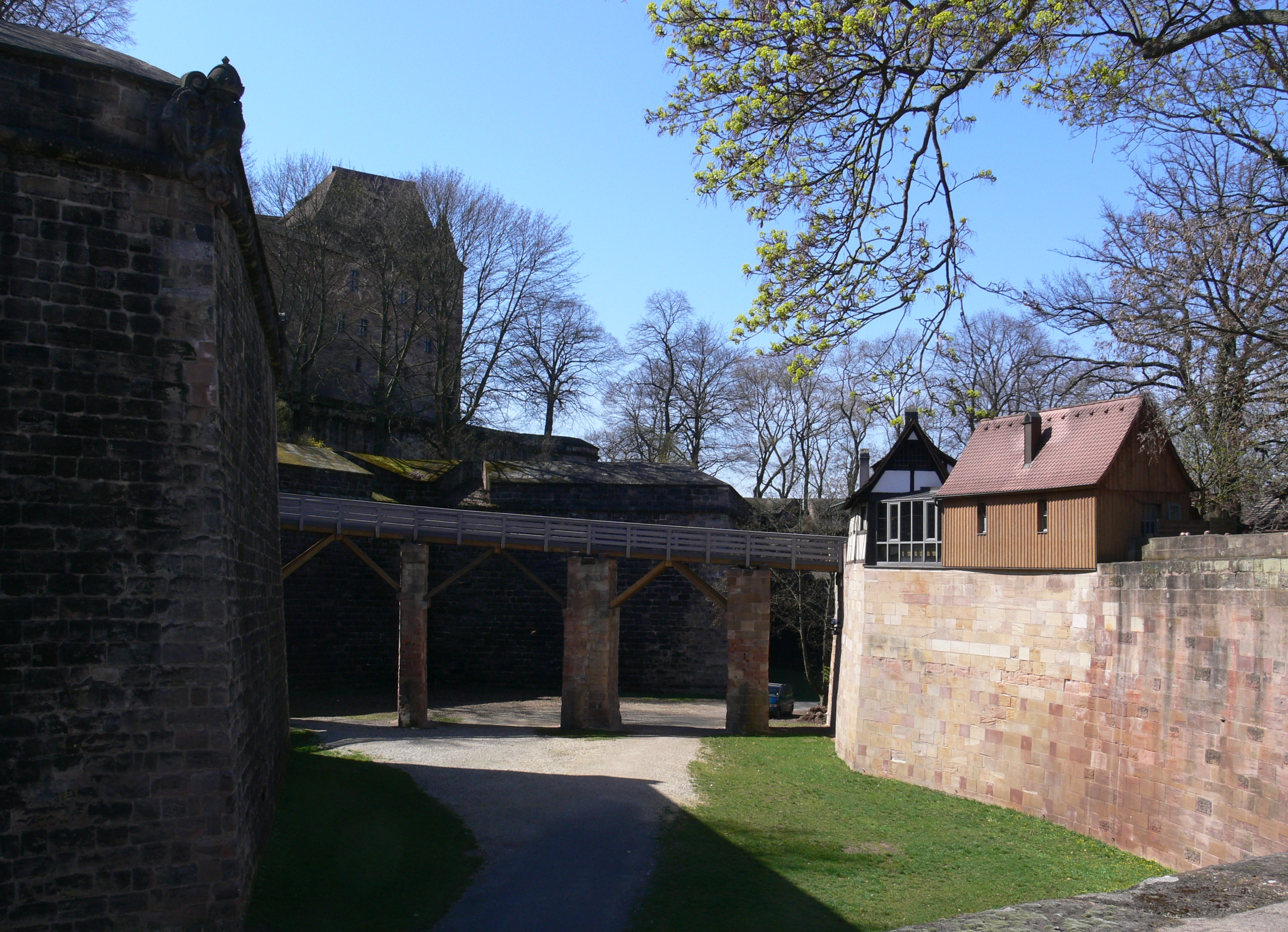 Nürnberg, Vestnertorbastei mit Torwächterhäuschen